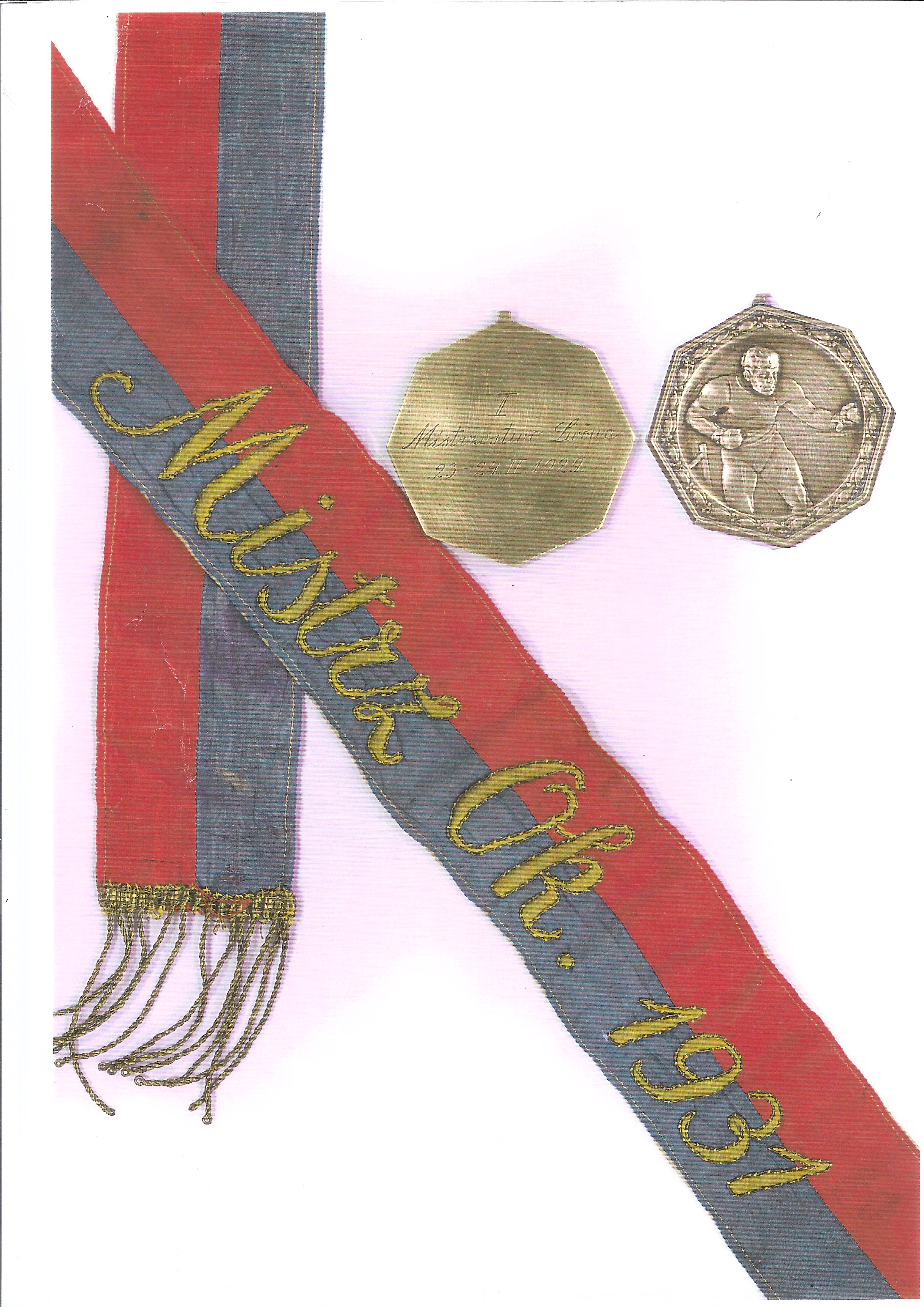 Szarfa Mistrz Ok. 1931 i medal I Mistrzostwo Lwowa w boksie 23-24 II 1929 r. - należące do Jana Kołodzieja